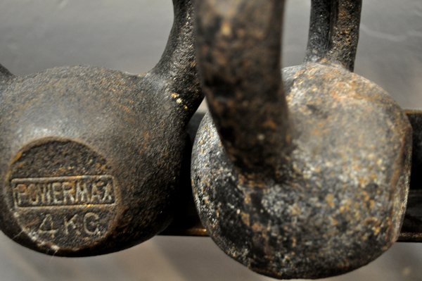 Kettlebells